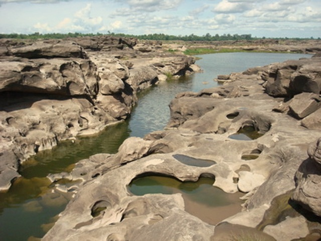 ภาพแสดงลักษณะของกุมภลักษณ์